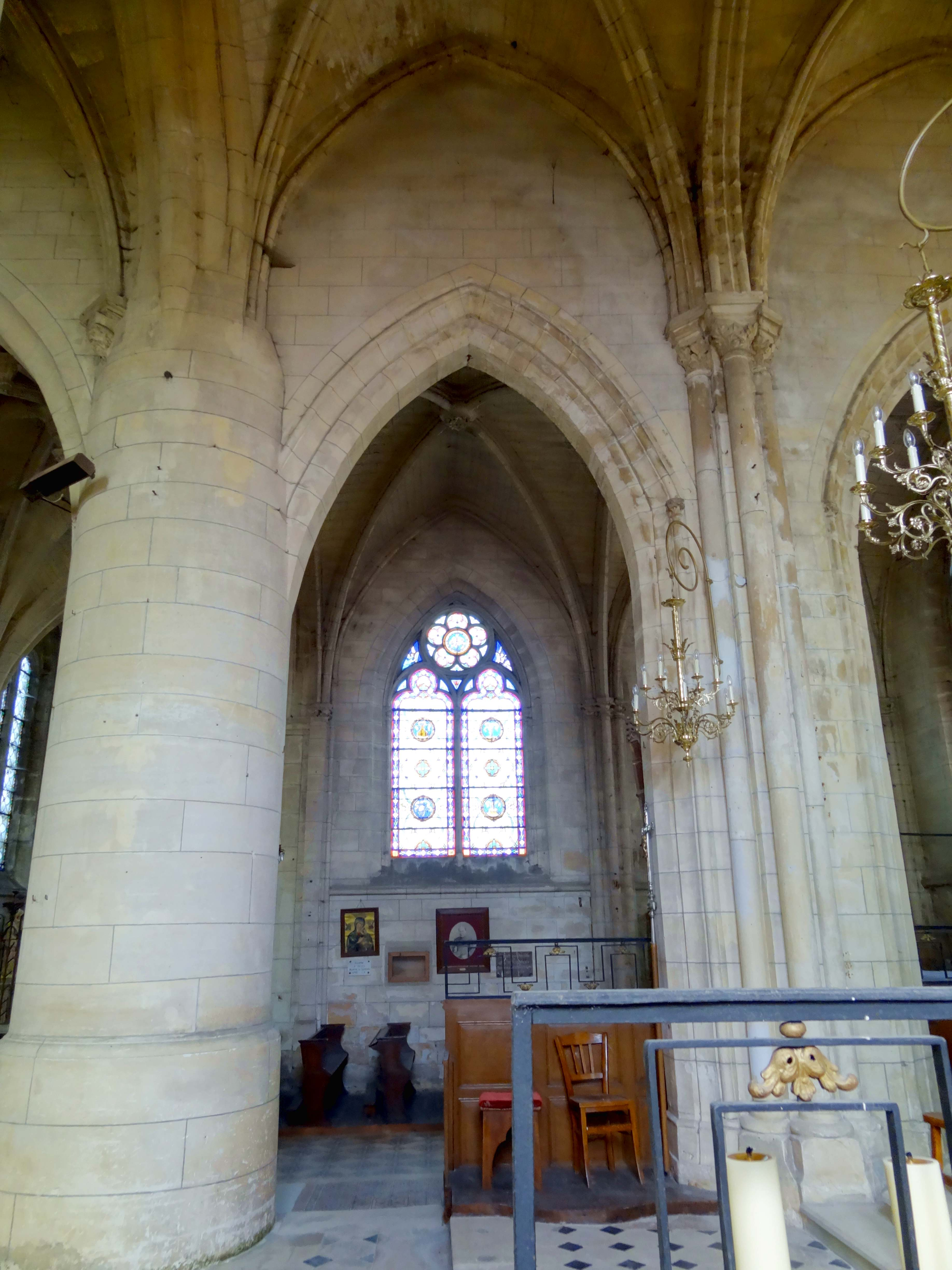 Intérieur de l'église - voir titre.